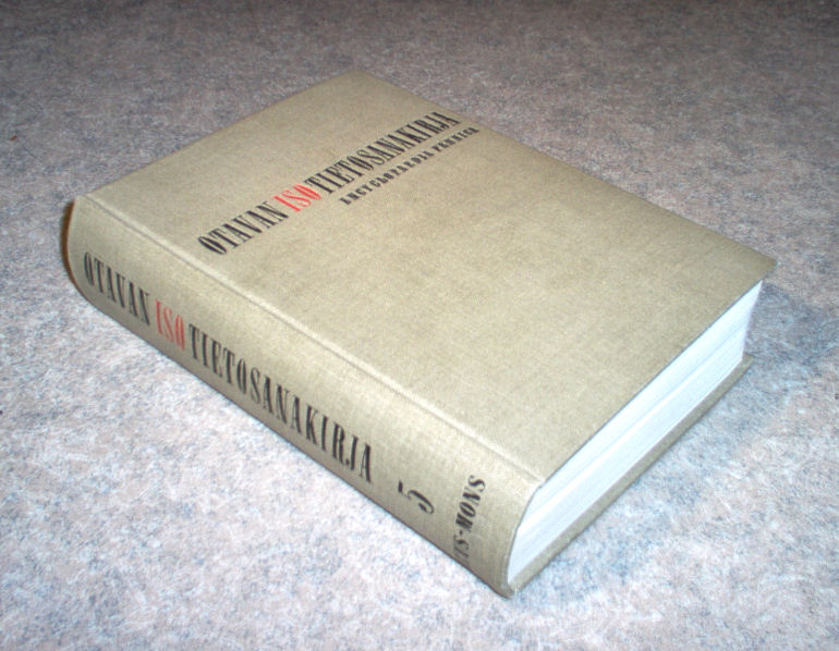 Image of Otavan Iso Tietosanakirja